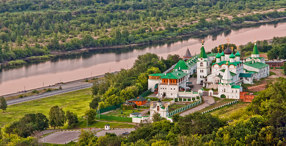 Печерский Вознесенский монастырь